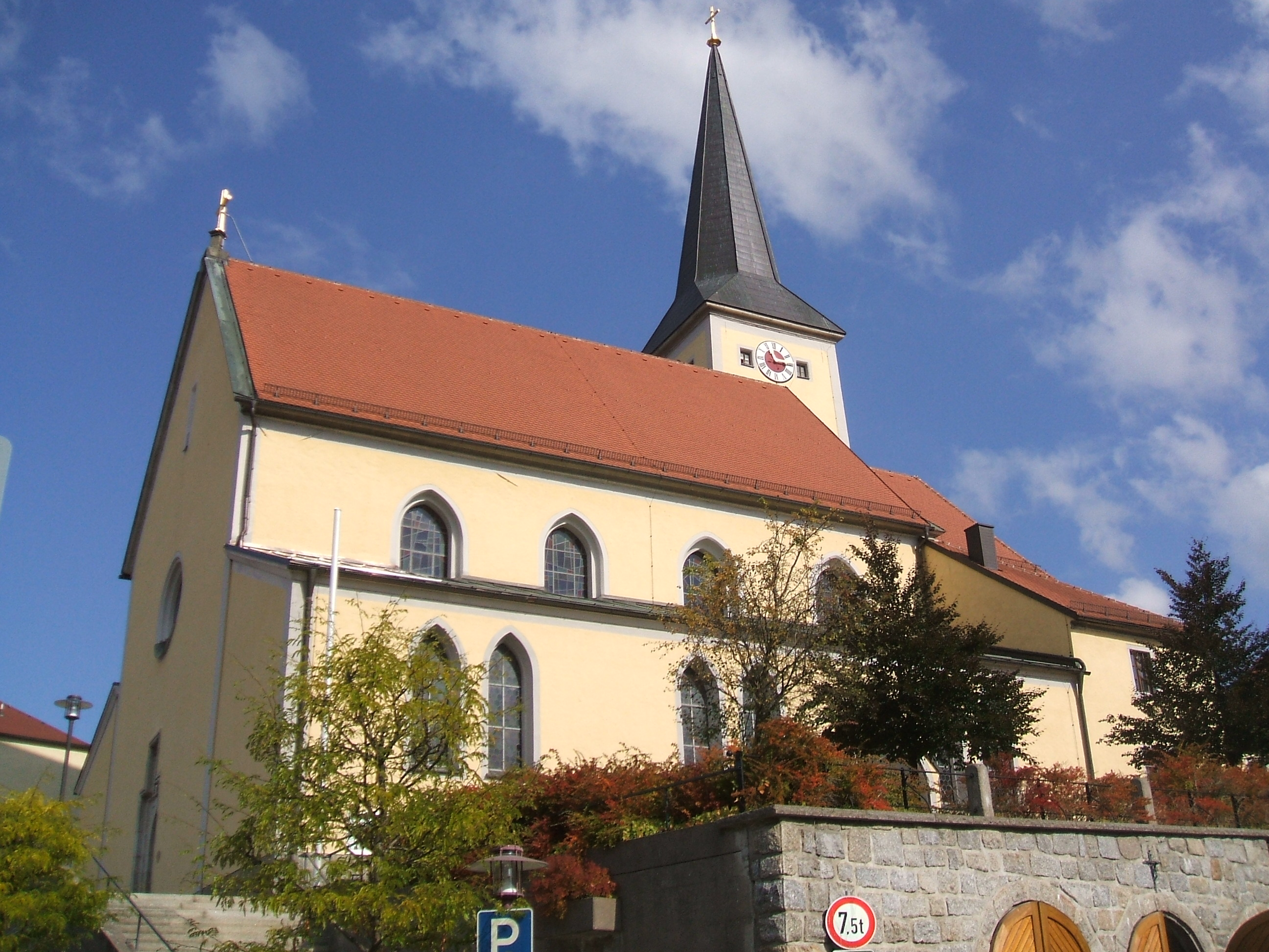 Stadtpfarrkirche St. Emmeram Windischeschenbach